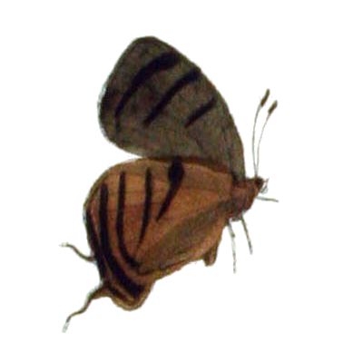 P[seudolycaena] paupera Felder = Theritas paupera (C. & R.Felder, 1865)